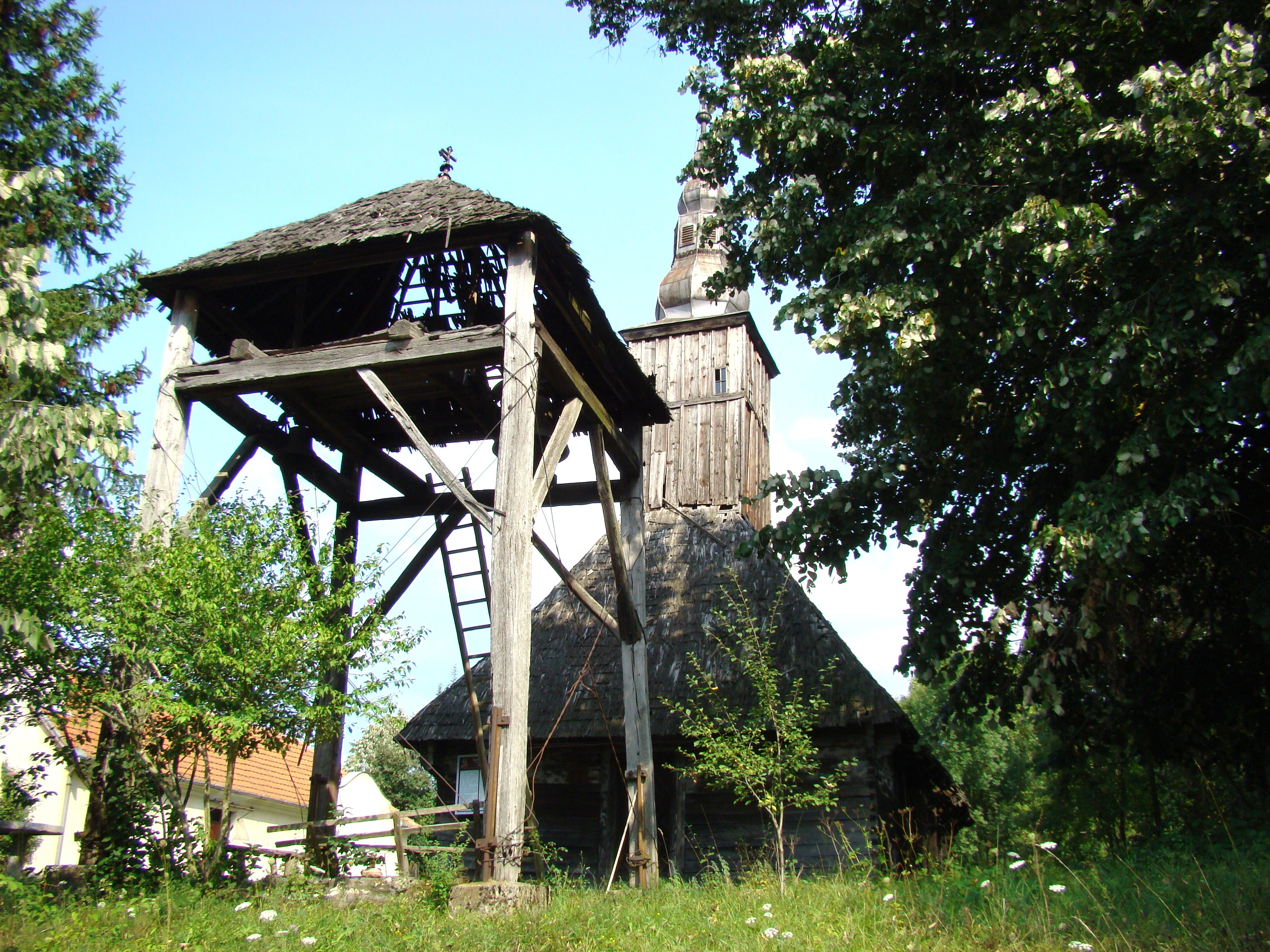 Biserica de lemn din Sălciua